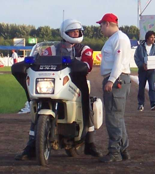 Ein Kradmelder (BMW; 16-76-02) des DRK auf dem Weltjugendtag 2005, Marienfeld